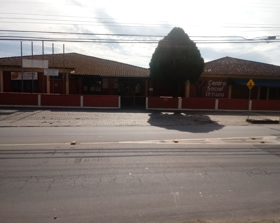 Fachada do Centro Social Urbano, bairro Iririú - Joinville.